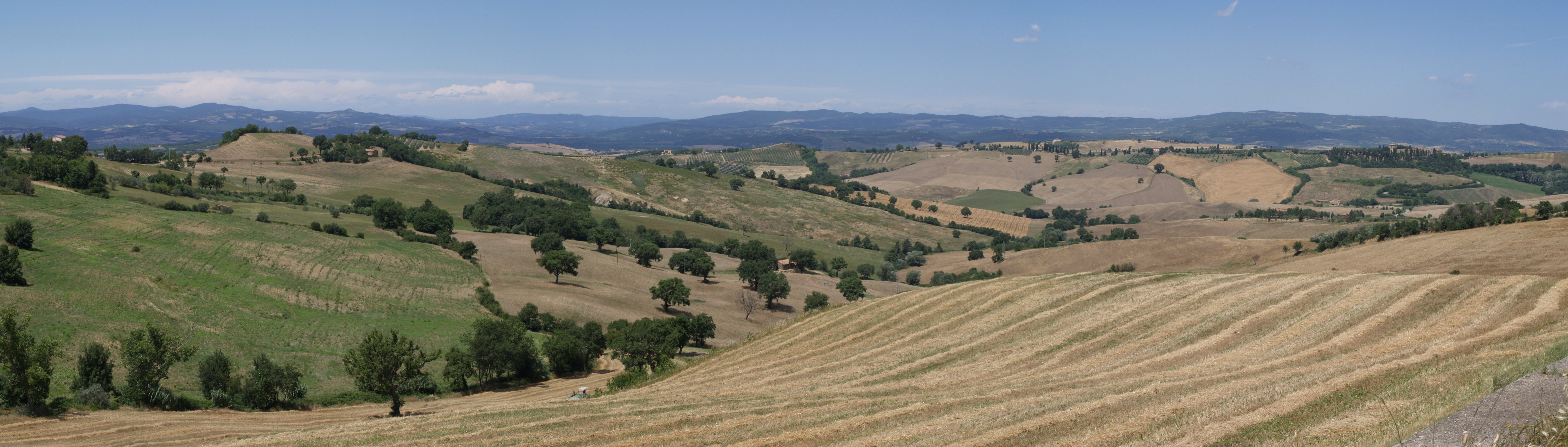 Crete Senesi